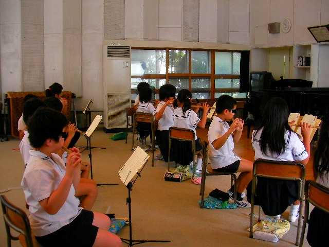 暁秀初等学校の音楽の授業風景。4年生以上で篠笛を取り入れている。